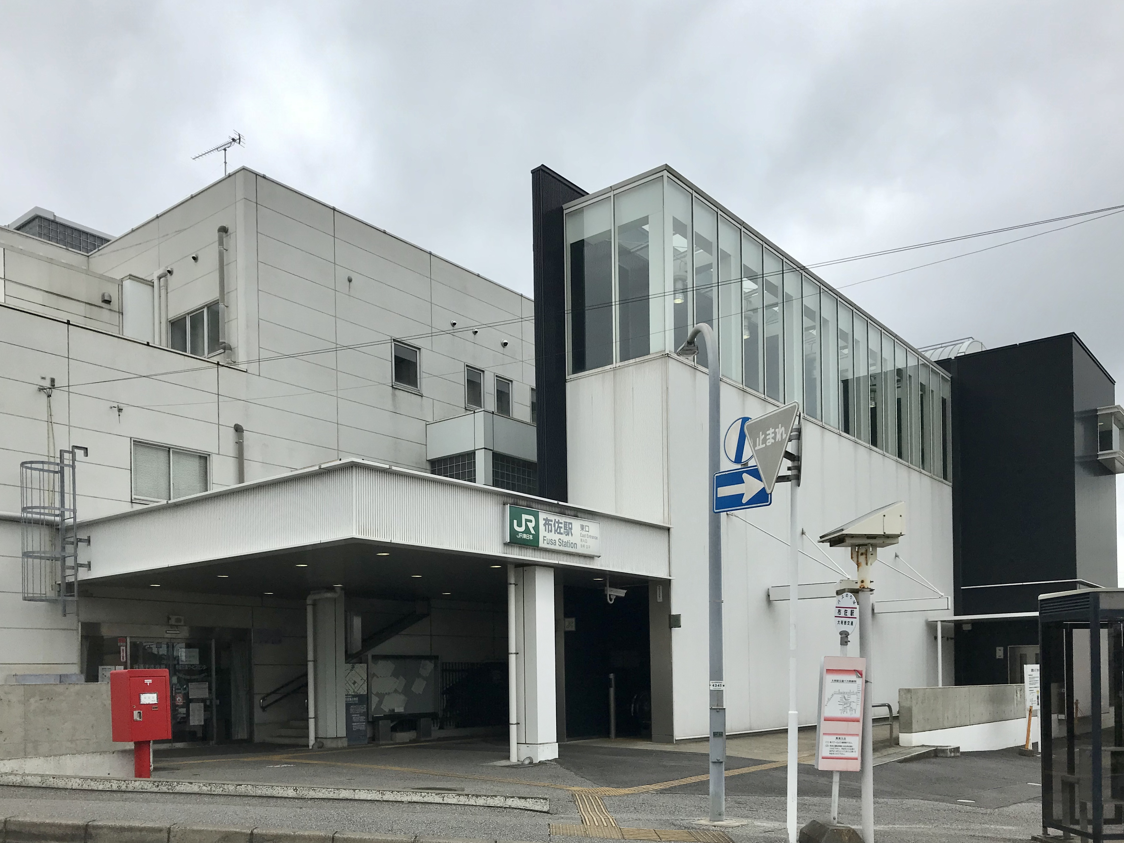 布佐駅東口